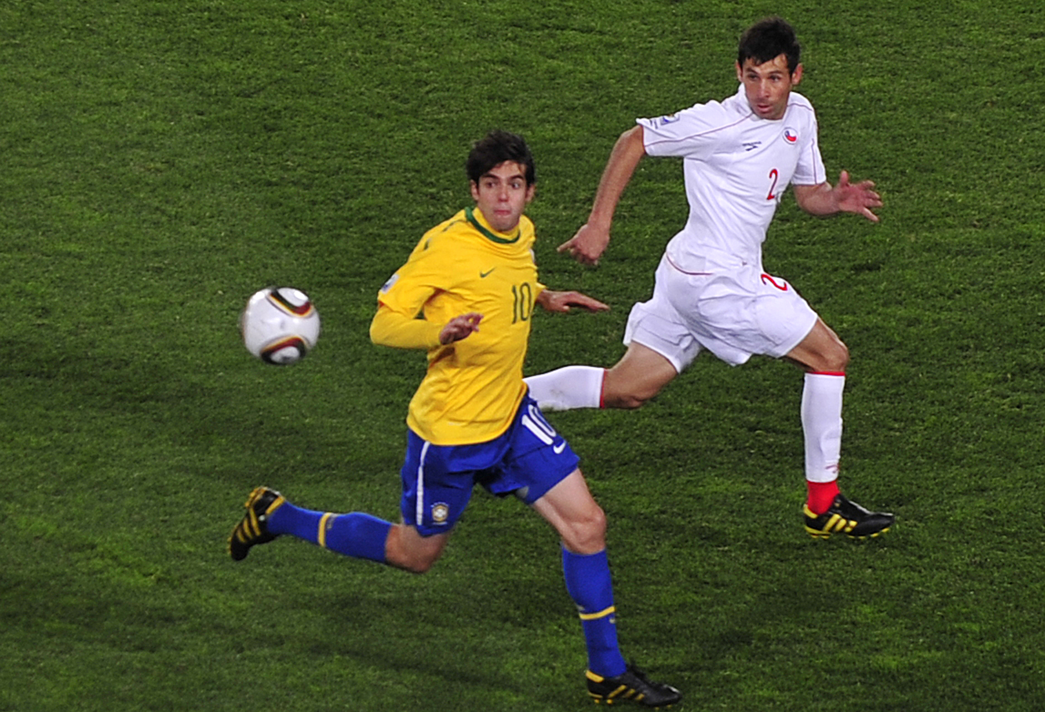 Joanesburgo - Kaká, um dos destaques da seleção brasileira na vitória sobre o Chile.